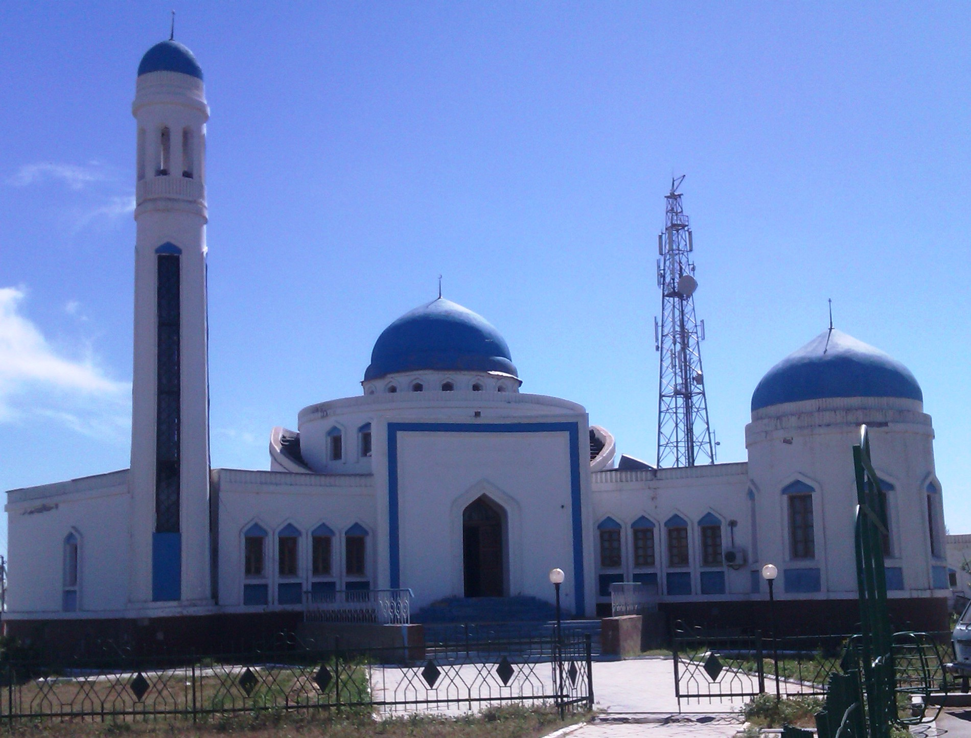 Ганюшкиндегі орталық мешіт. Атырау облысы. Қазақстан